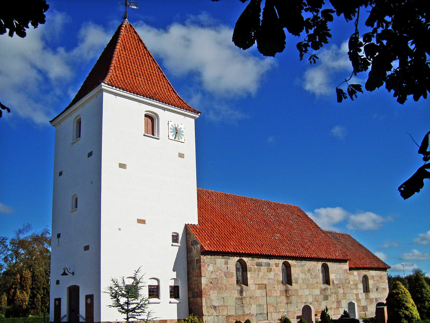 fra sydvest